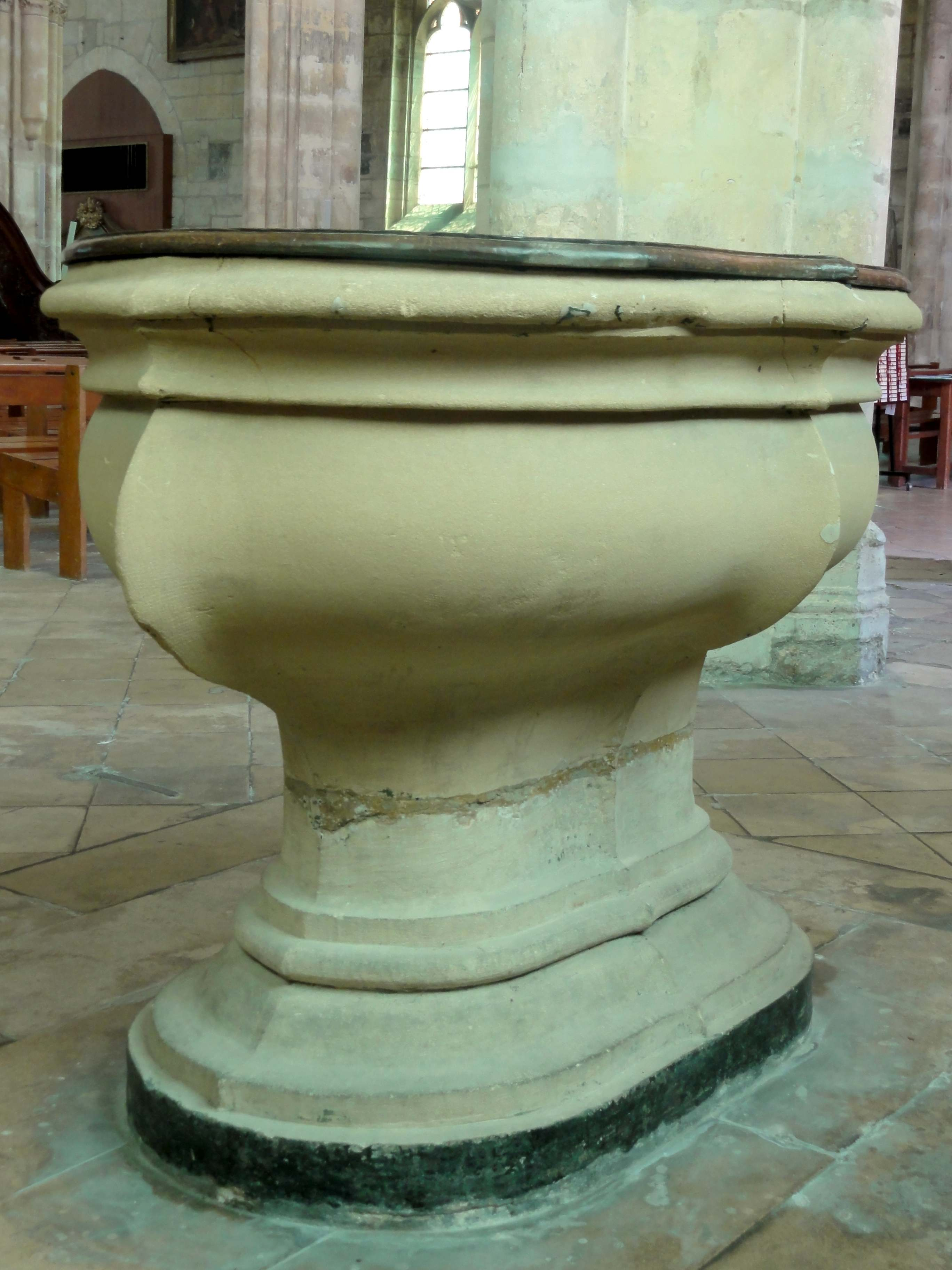 Bas-côté nord, fonts baptismaux.